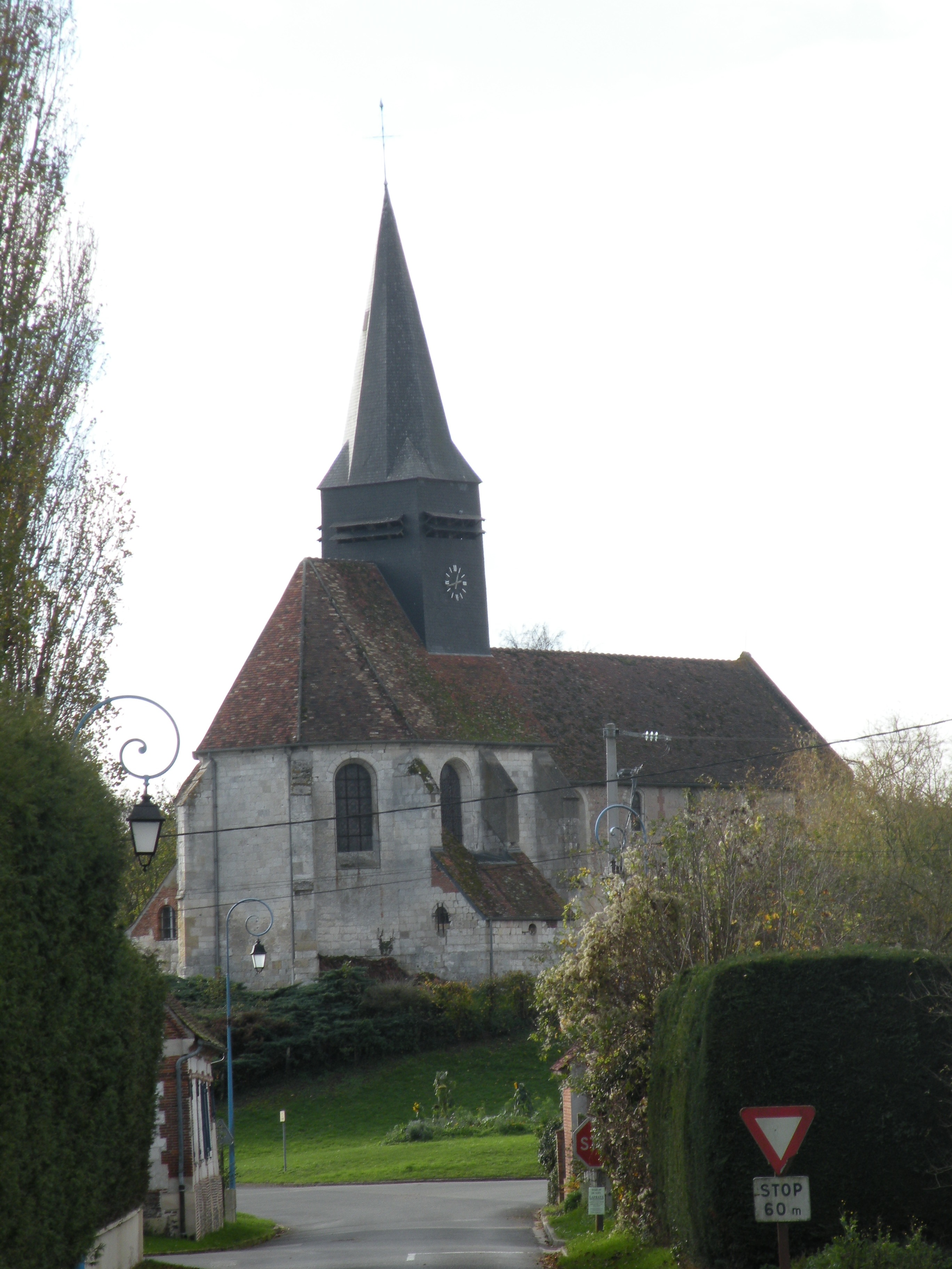 Église de la Nativité de Notre-Dame de Velennes